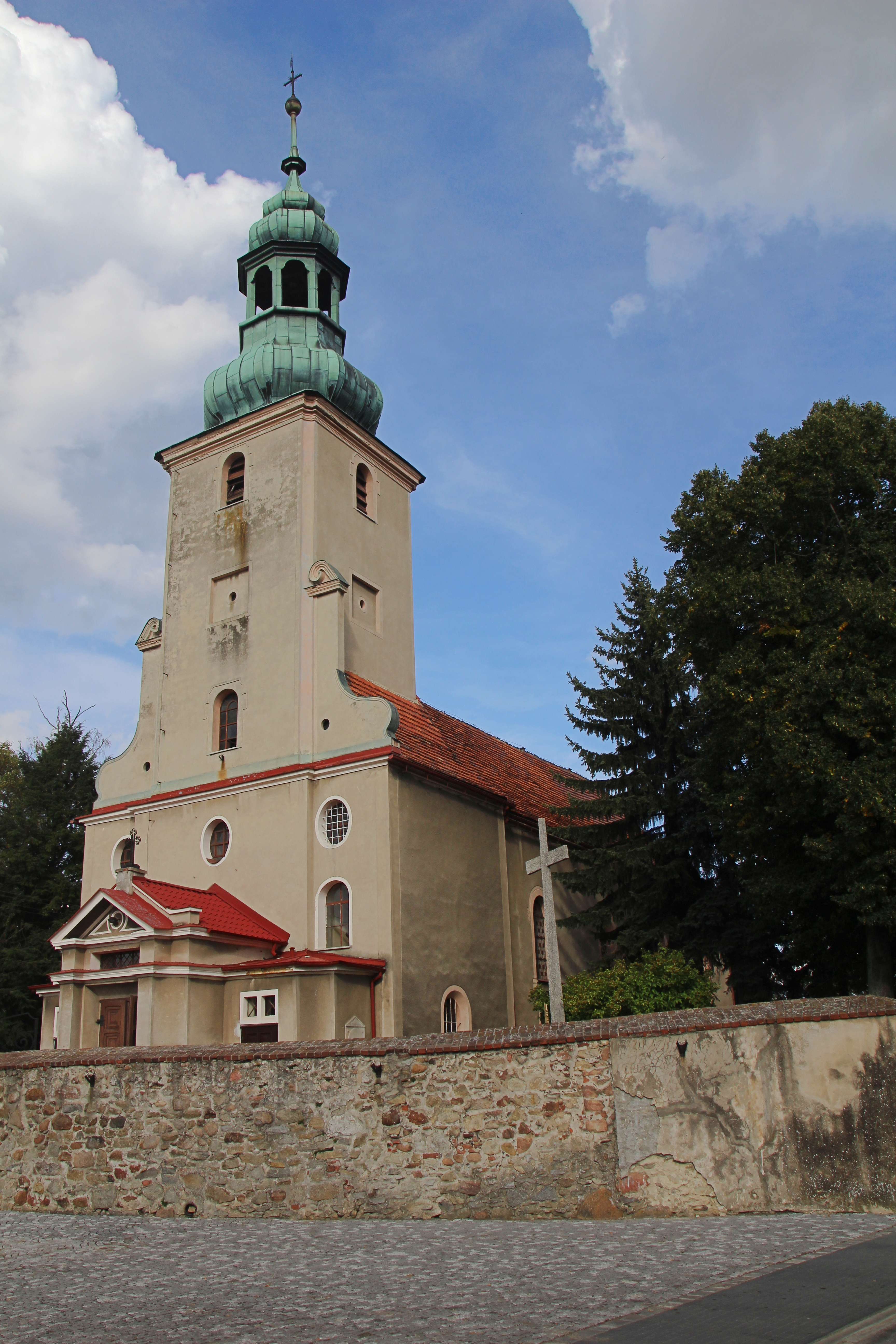 Karłowice Wielkie – rzymskokatolicki kościół parafialny pw. św. Marii Magdaleny, 1758.